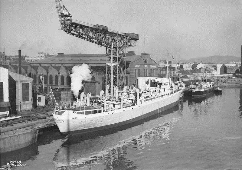 Akers mekaniske verksted, skip Balkis, skip Vardø, Vestbanestasjonen.